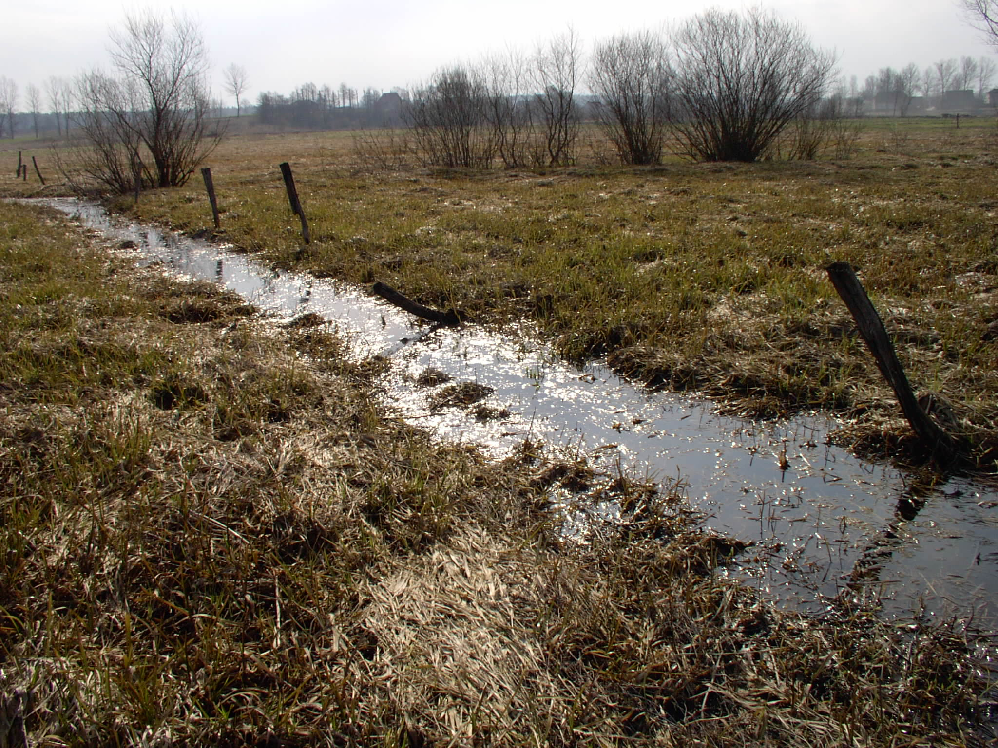 Smolajny, rów w dolinie Łyny, wczesna wisona